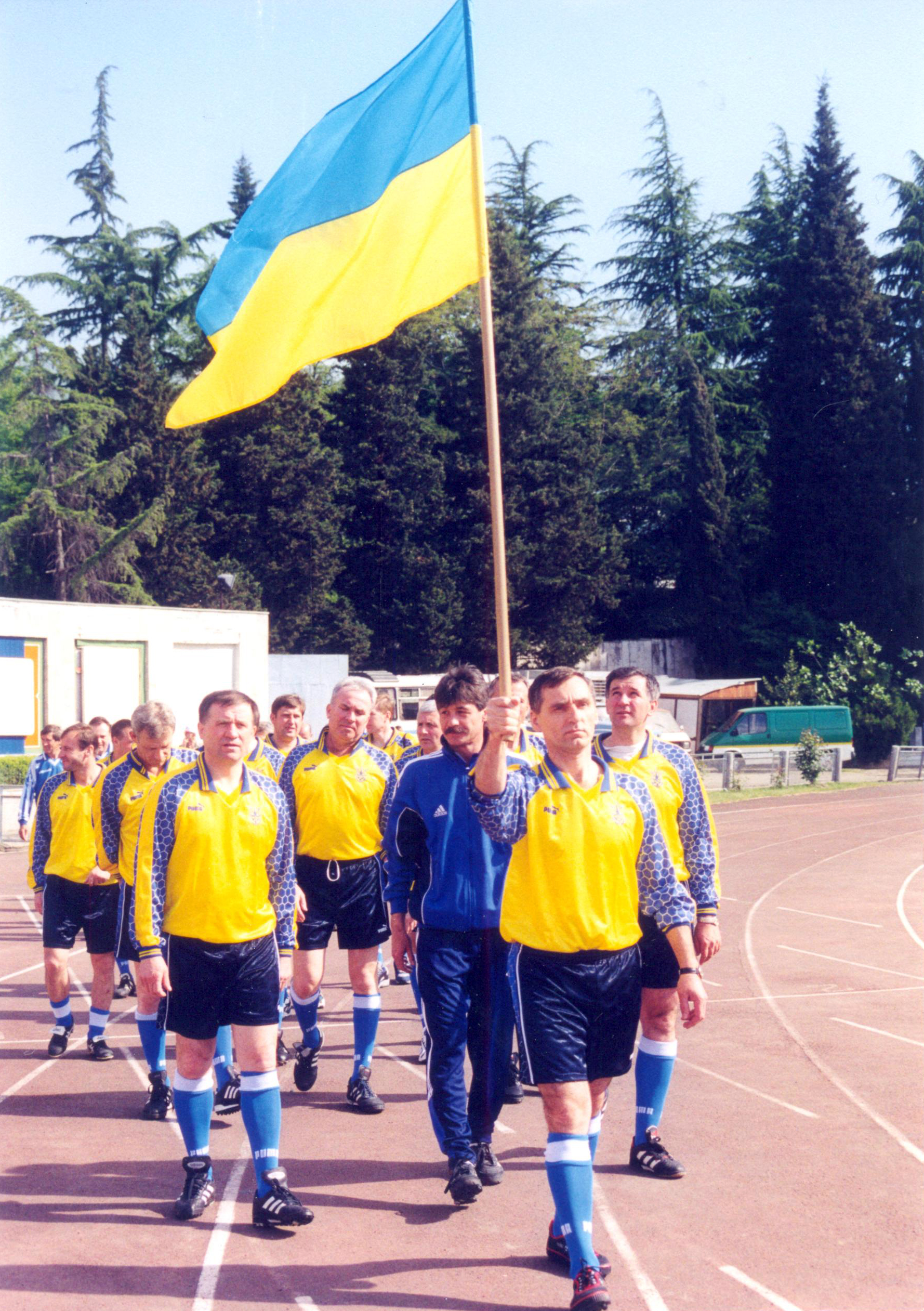 Олександр Кулик несе прапор на товариській зустрічі збірних команд Верховної Ради України та Держдуми Росії